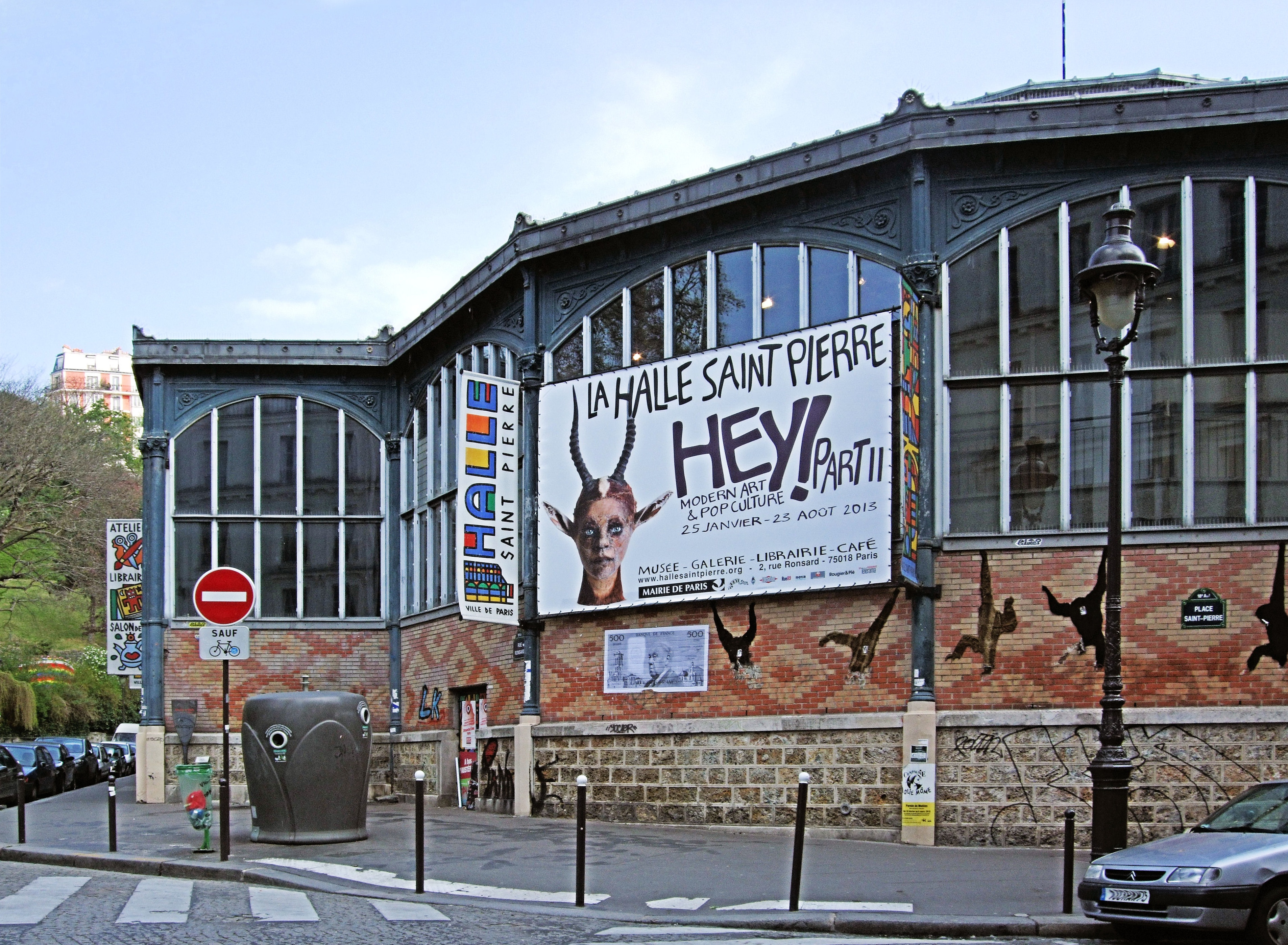 Halle Saint Pierre In Montmartre, Paris.